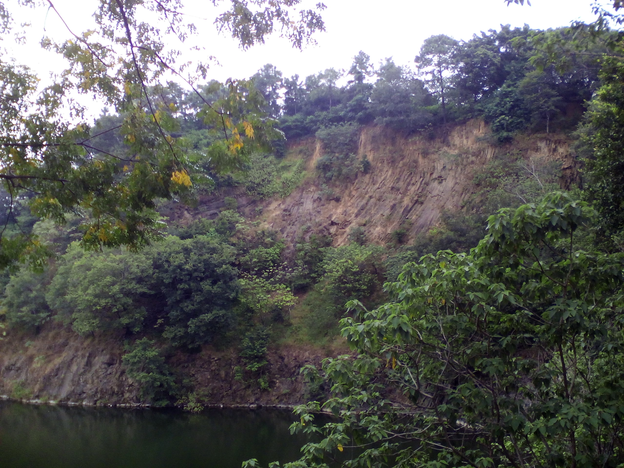 Wangjiegang Hill, Wangjiegang Park in Chancheng District, Foshan City, Guangdong Province, China